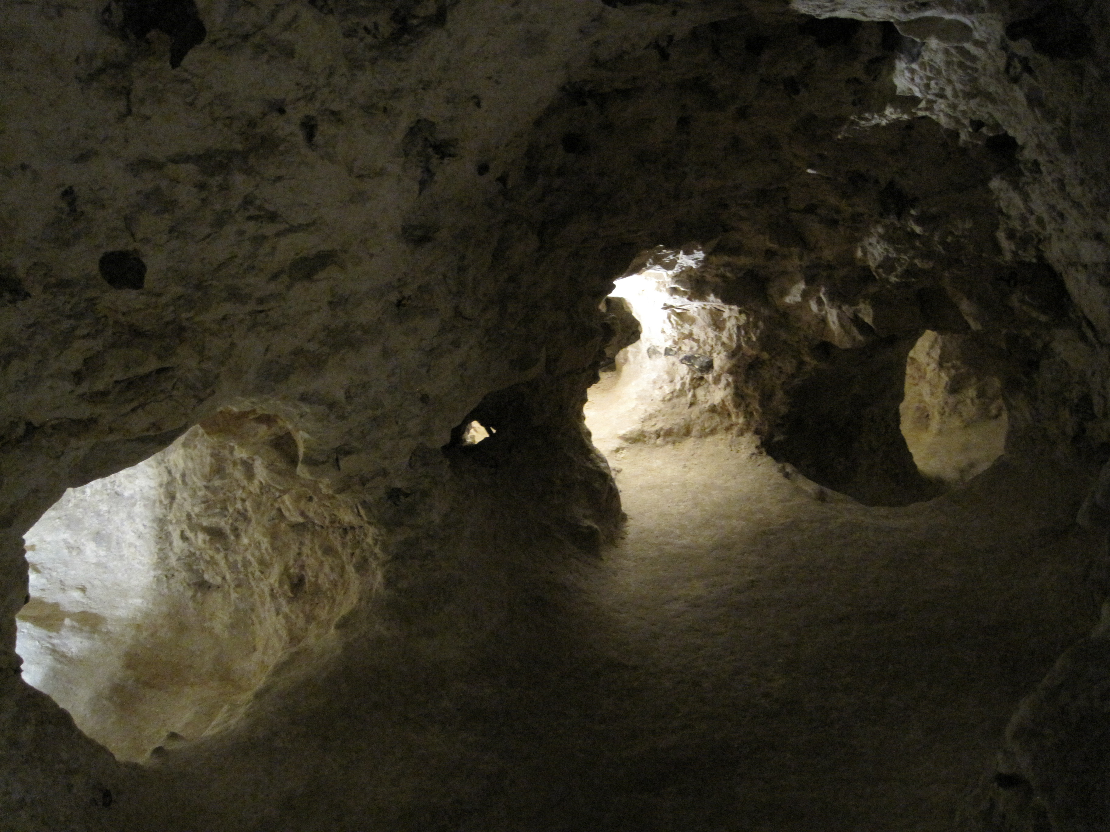 Spiennes (Belgique), minières néolithiques de silex du "Camp à Caillaux".Unknown spiennes (belgium), neolithic mines of flint of the "camp à caillaux.Unknown spiennes (belgium), neolithische vuursteenmijnen van de "camp à caillaux.Unknown spiène (bèljike), mines néolitiques di cayaus do "camp a cayaus".